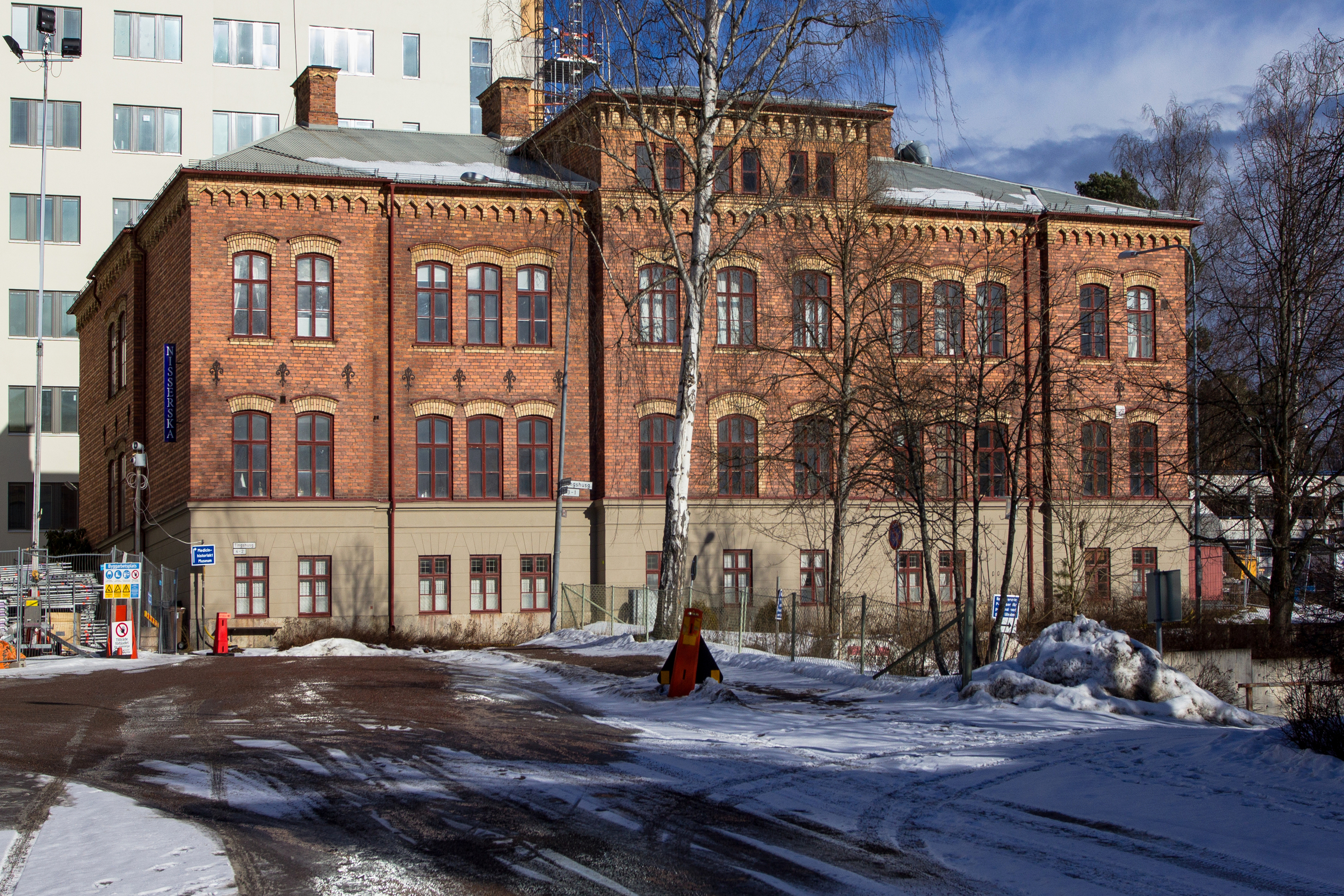 Nisserska huset, med Nisserska teatern och medicinhistoriska museet. Falu lasarett, Falun, Sverige. Omgiven av ombyggnaden av Falu lasarett, främst BB-avdelningen.